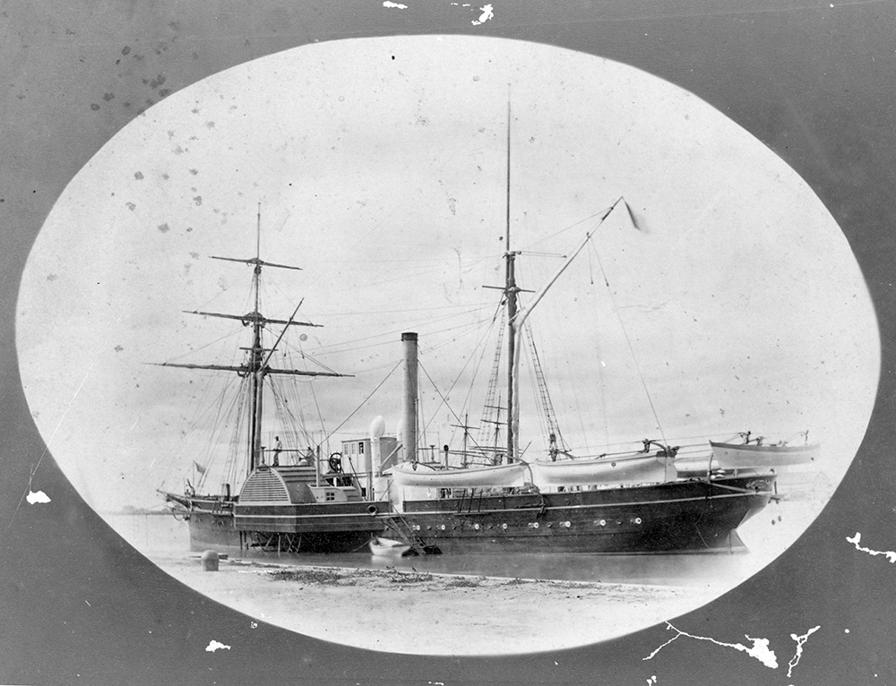 Bateau à vapeur avec roues à aube - sans doute localisé du côté de la méditérranée